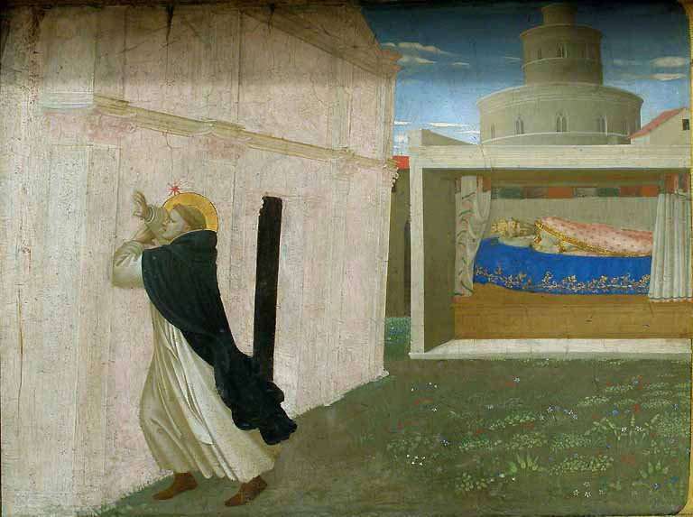 Angelico, predella dell'incoronazione della vergine del louvre, storie di san domenico, 1434-35 00 sogno di san domenico.jpg